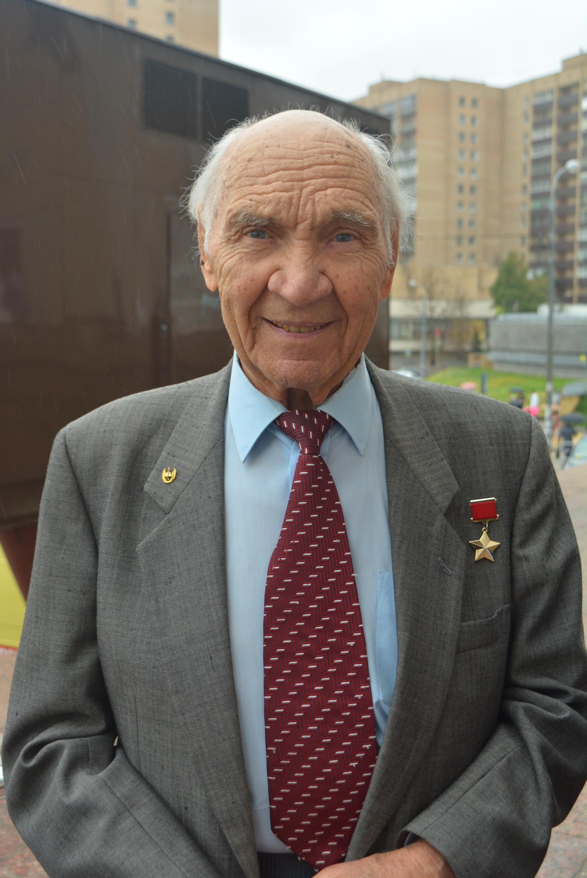 Герой Советского Союза Георгий Константинович Мосолов